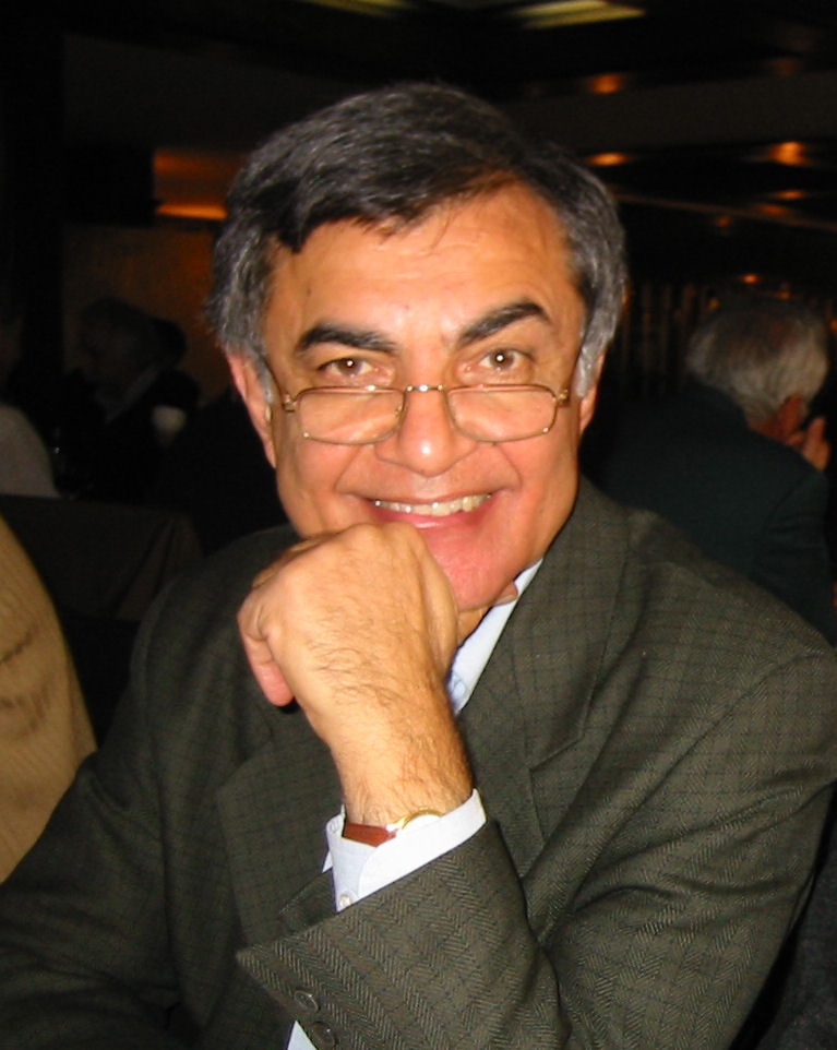 Djamchid Momtaz